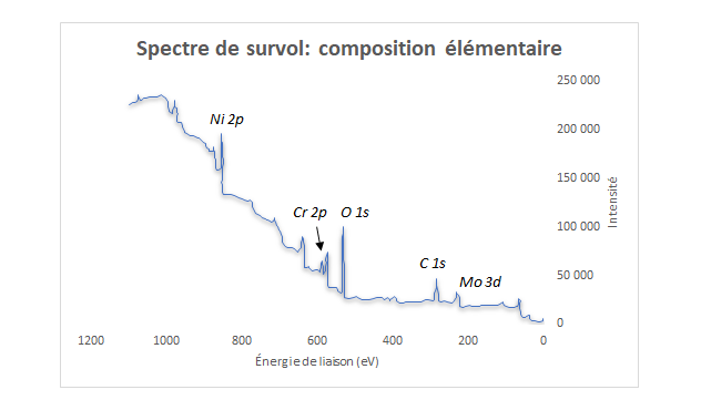 Spectre de survole XPS